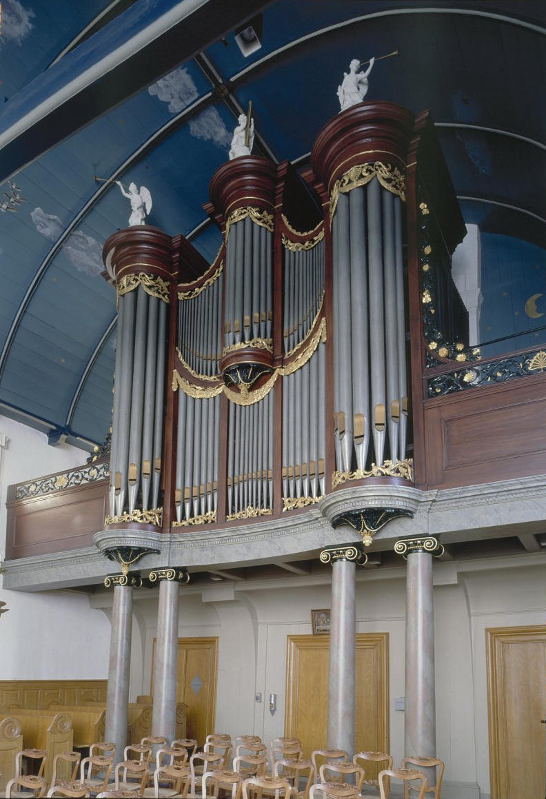 Nederlands Hervormde Kerk: Interieur, aanzicht orgel, orgelnummer 869 (opmerking: Gefotografeerd voor Het Historische Orgel in Nederland 1840-1849)